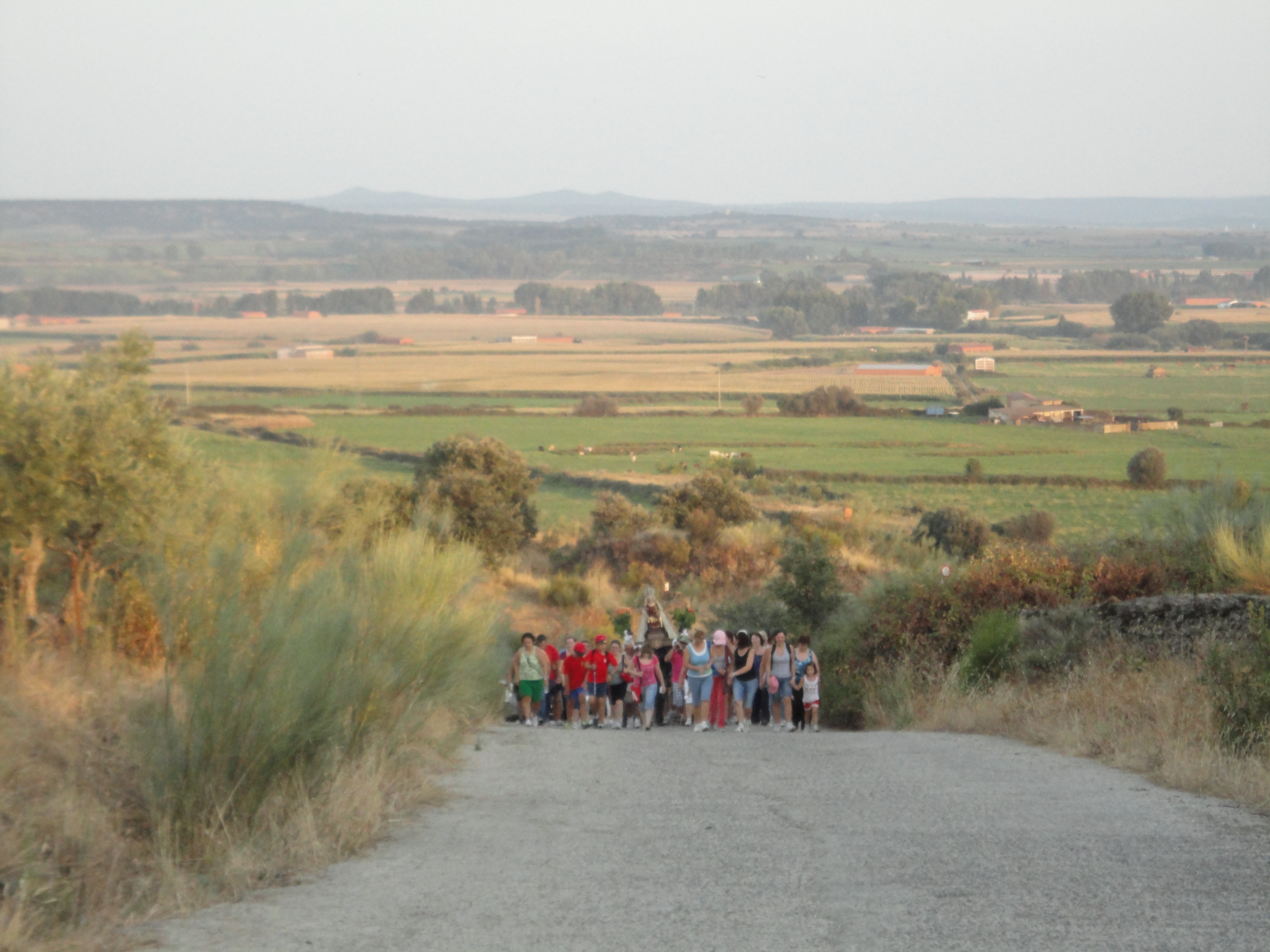 Copia de la Virgen de Valdefuentes subiendo en procesión hacia Montehermoso, provincia de Cáceres, España. Al fondo pueden verse las Vegas del Alagón.